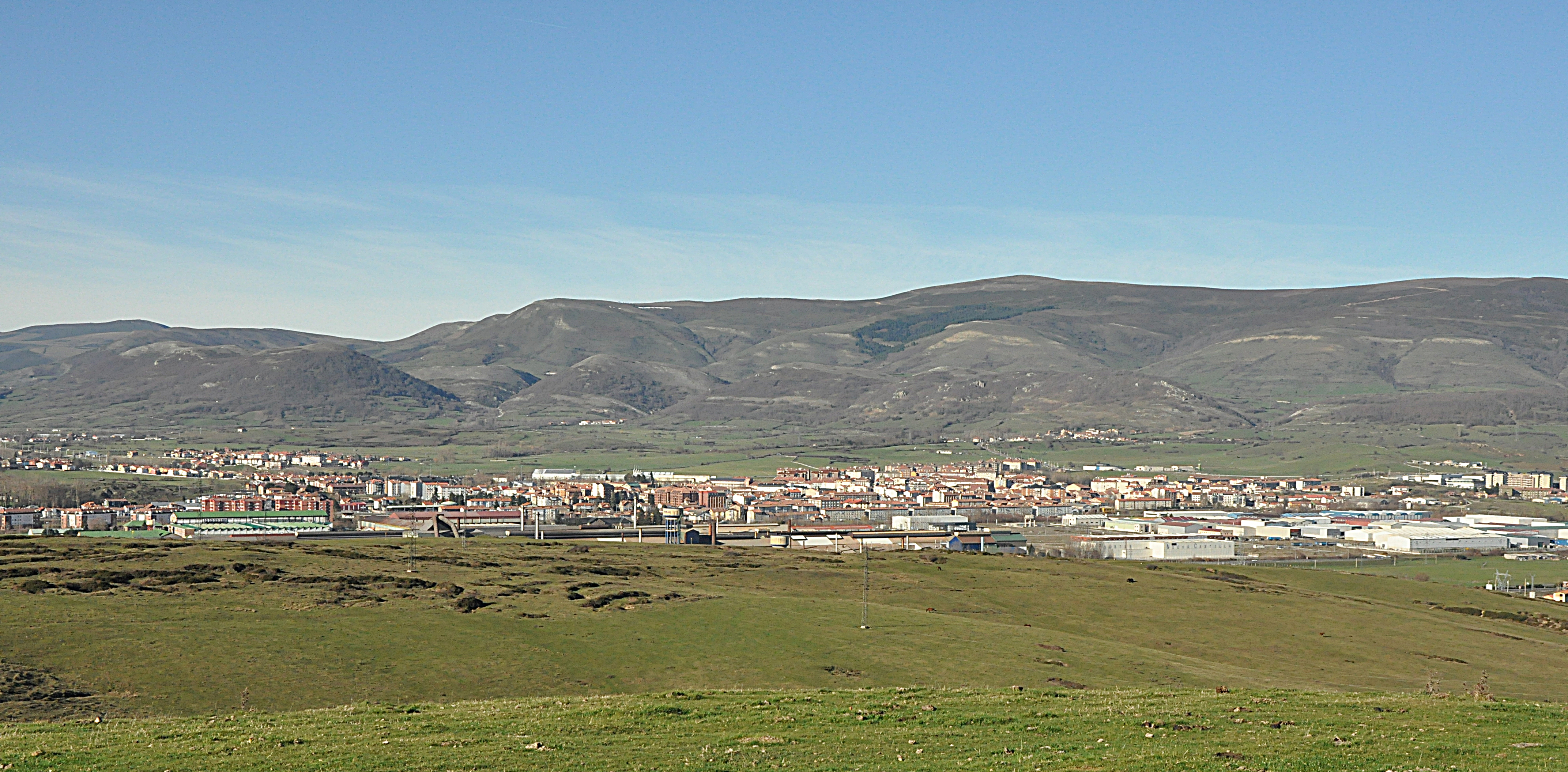 Panorámica de la ciudad de Reinosa, capital del municipio homónimo y centro administrativo y económico de la comarca cántabra de Campoo-Los Valles.